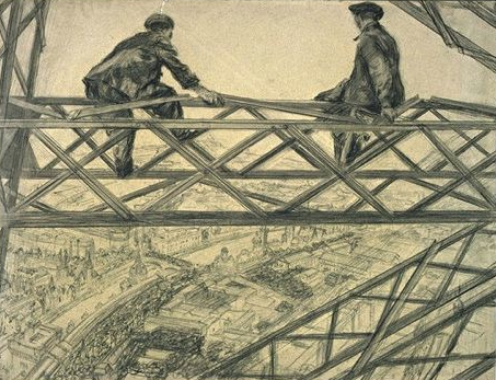 Vue des ouvriers de la Tour Eiffel par Paul Renouard